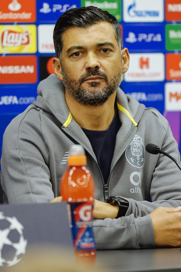 Икер Касильяс вместе с «Порту» готовится к матчу с «Локомотивом»